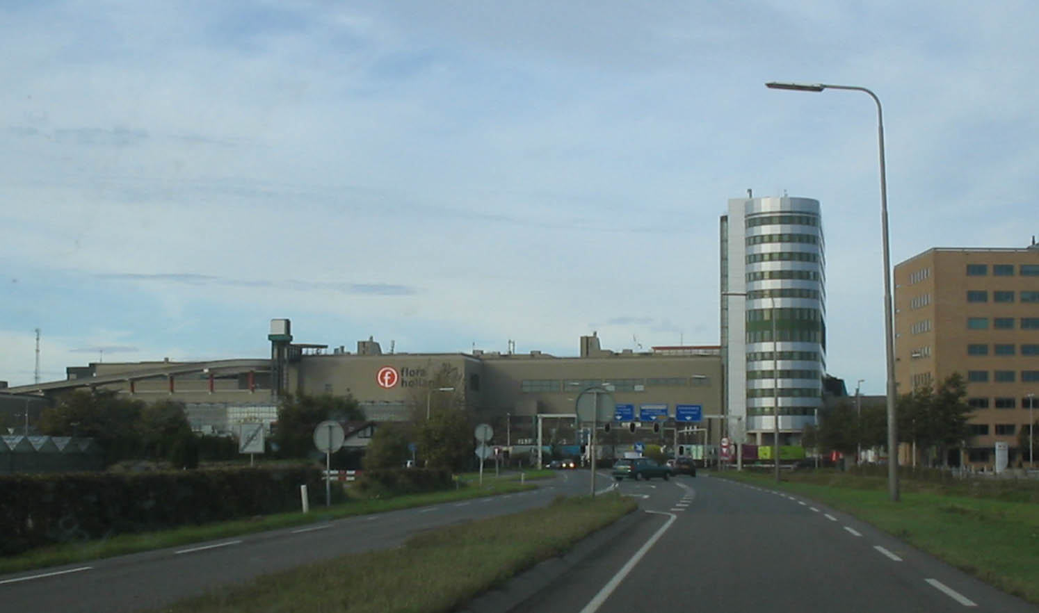 Naaldwijk, veilingcomplex, 6 november 2005